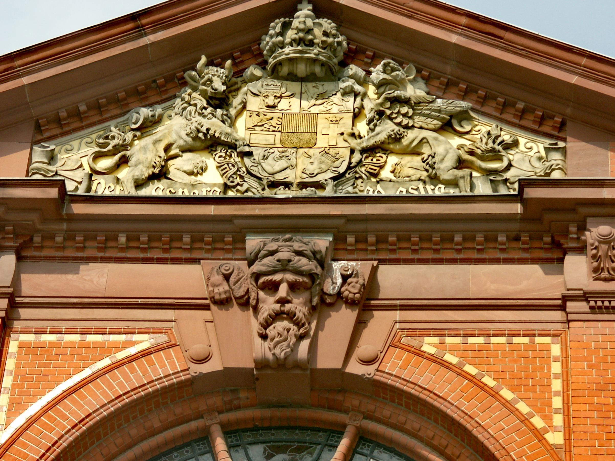 Gebäude der Reichsbahndirektion Schwerin in der Paulsstadt, Portalwappen Mecklenburg